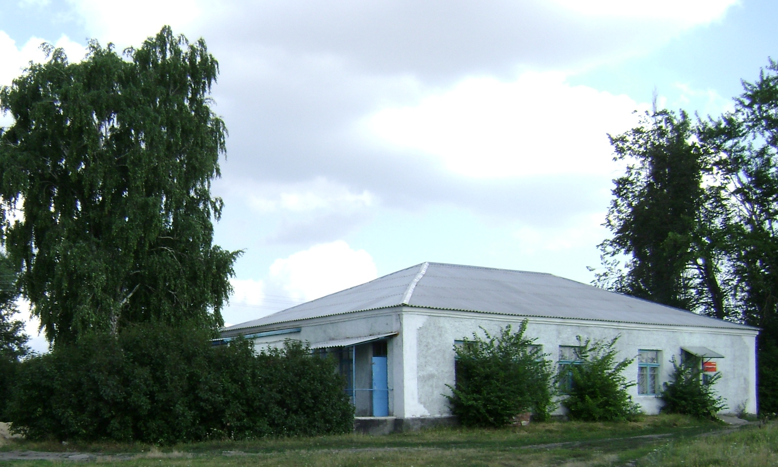 Библиотека и почта в Горожанке (Рамонский район, Воронежская обл.)